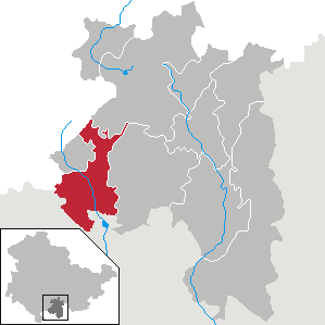 Schalkau in Thüringen, Landkreis Sonneberg